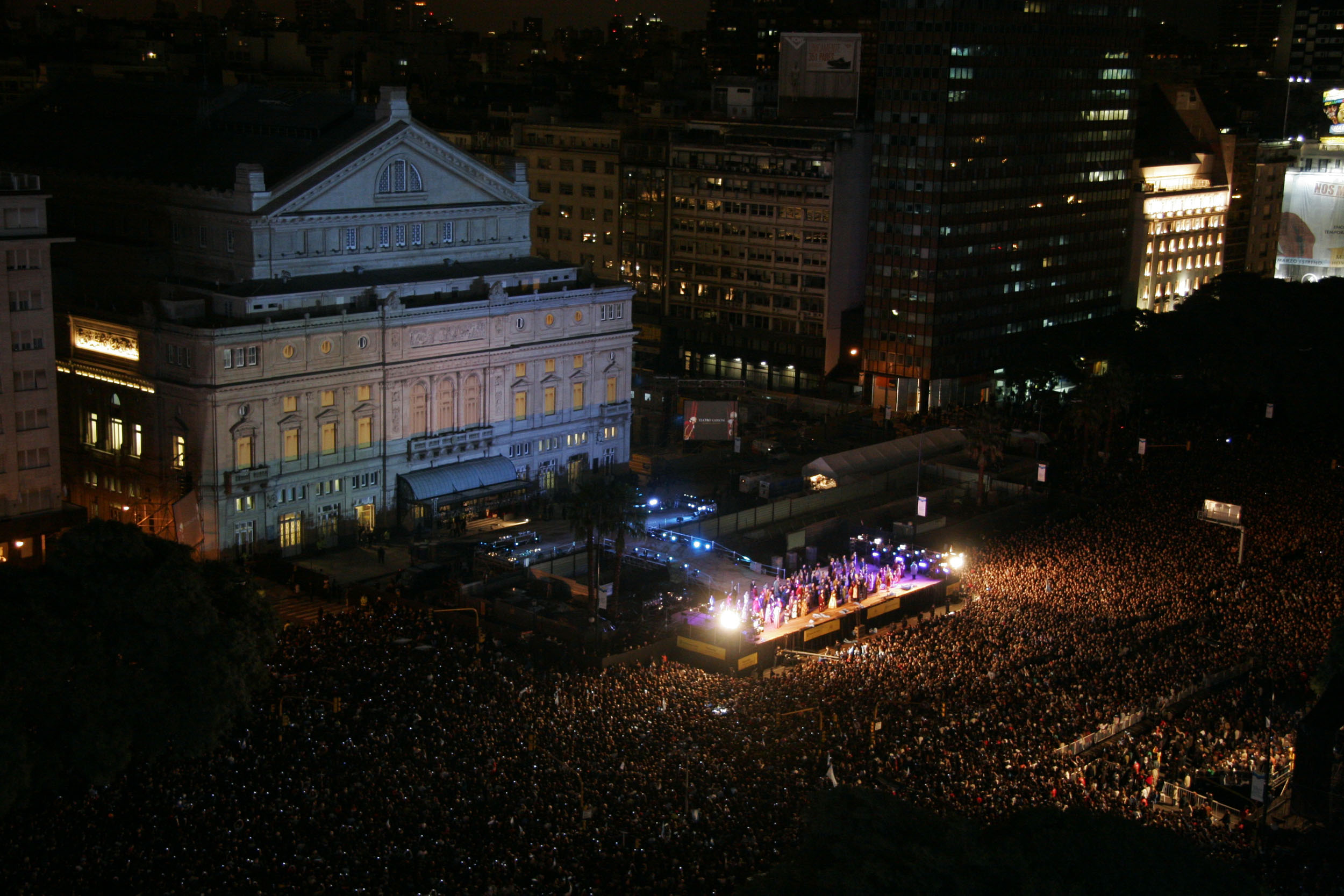 Gala de reapertura del Teatro Colón. Vista exterior del Teatro.